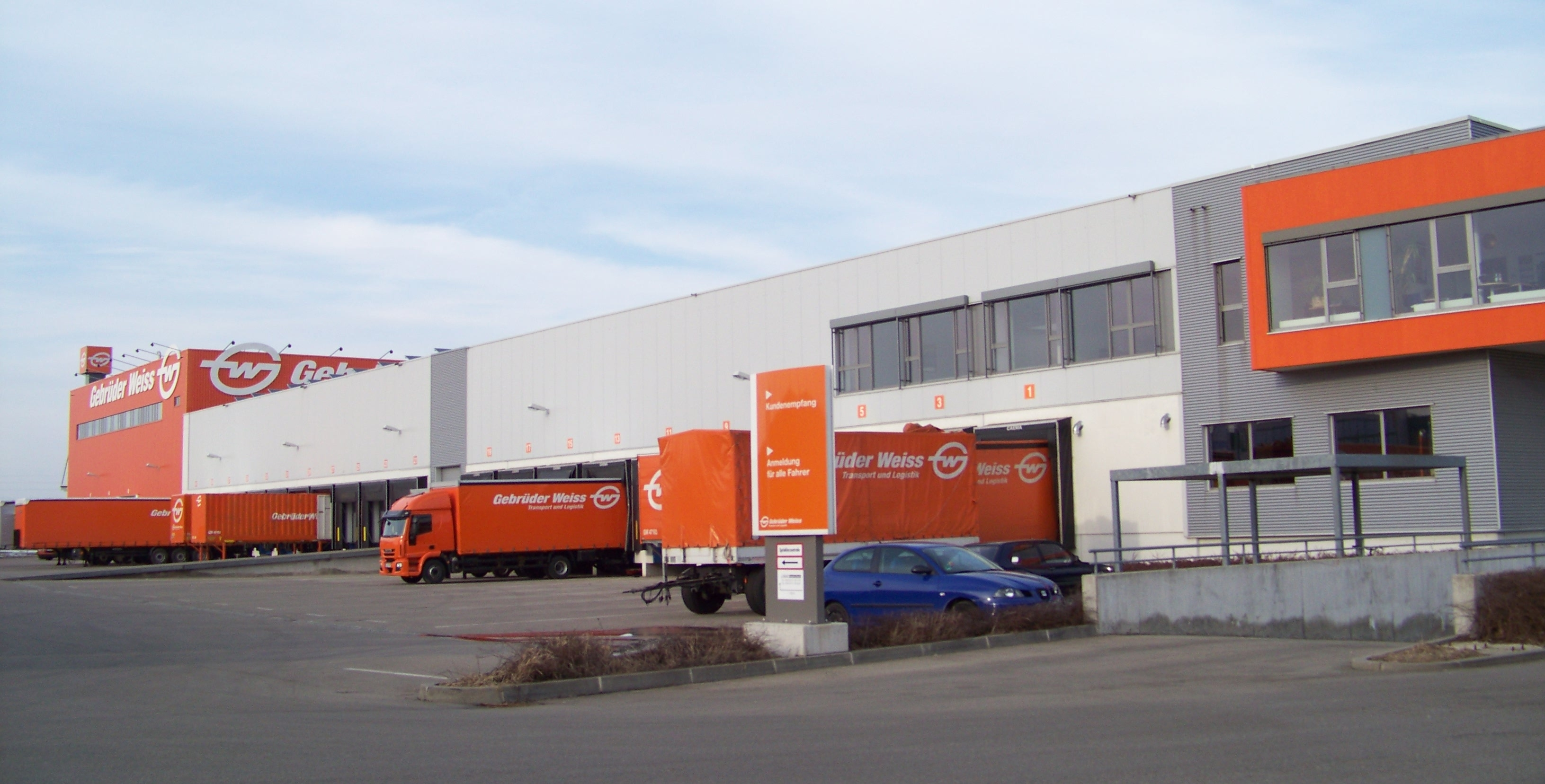 Ein Bilder der Speditionsniederlassung "Gebrüder Weiss" am Standort Memmingen (PLZ: 87700)im Süden Deutschlands.